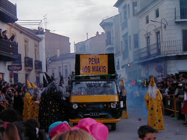 Desfile de Carnaval de Tarazona de la Mancha. Peñas de carnaval